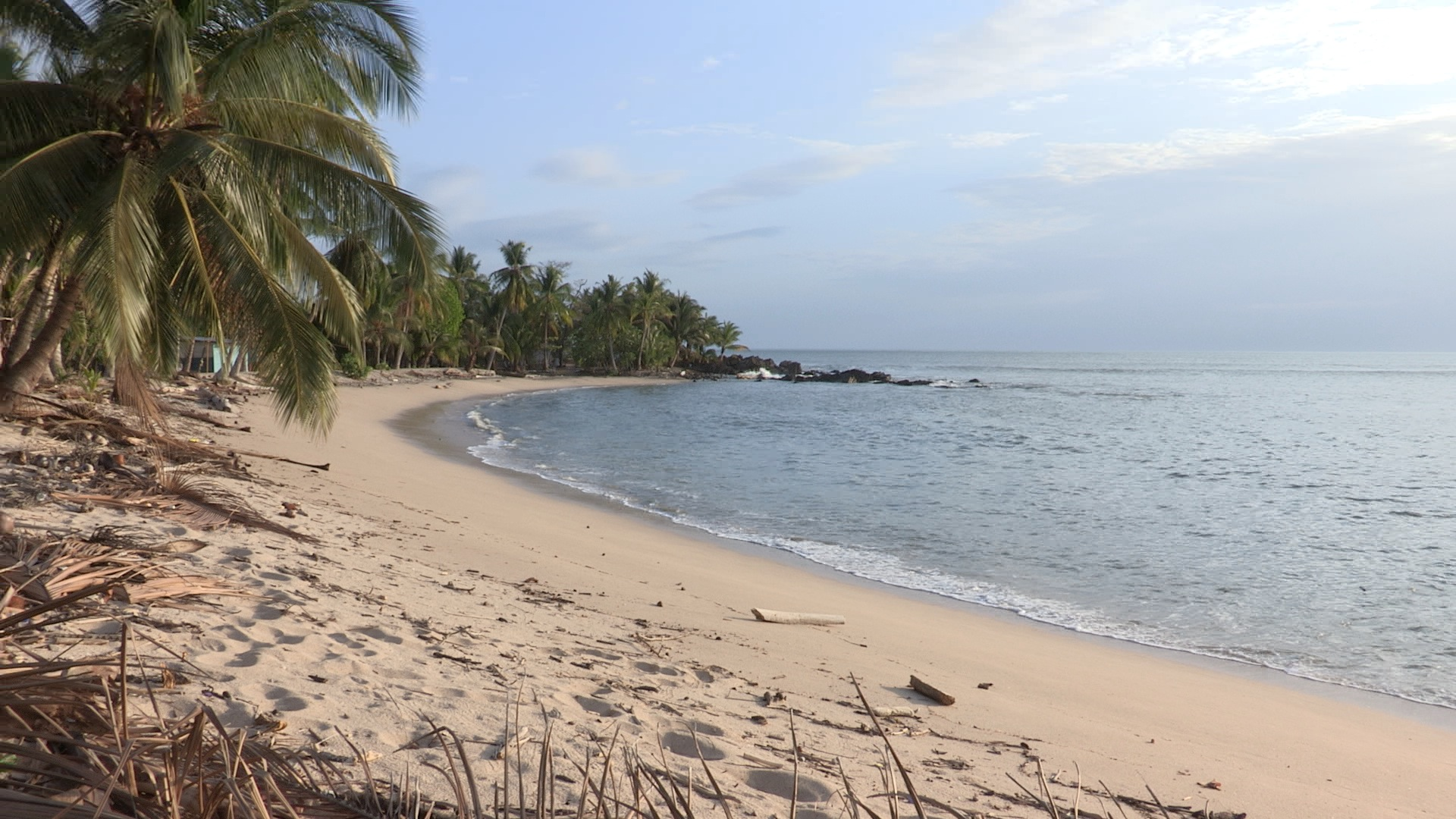 Playa de Gonzalo Vázquez. Lugar de la segunda toma de posesión de Núñez de Balboa el 29 de Octubre de 1513